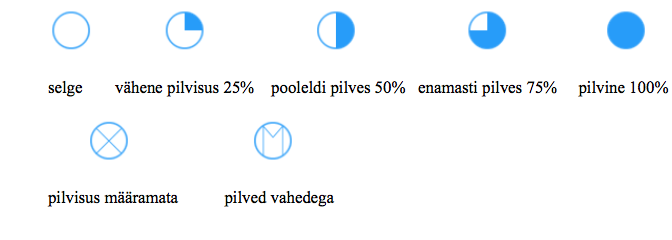 pilvisuse leppemärgid